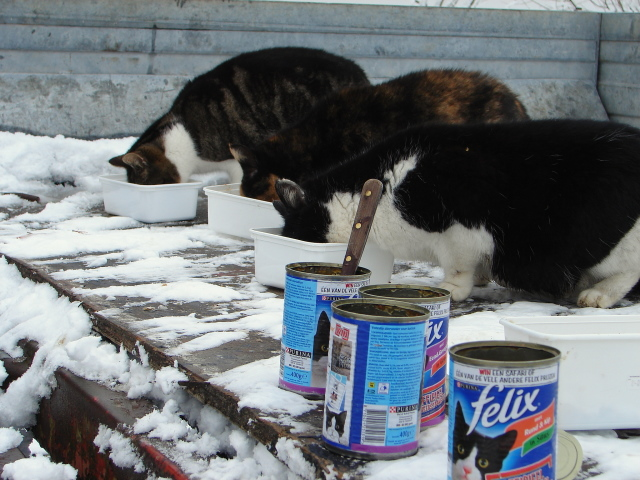 winterkost